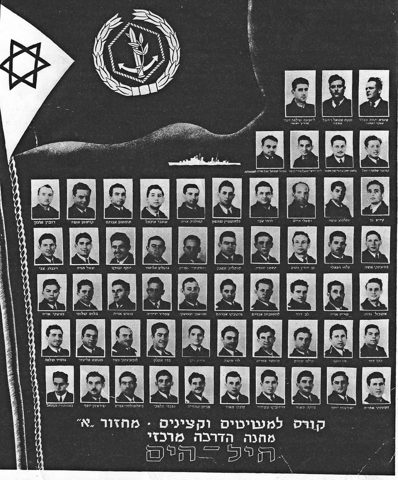 תמונת מחחזור קורס חובלים אלף